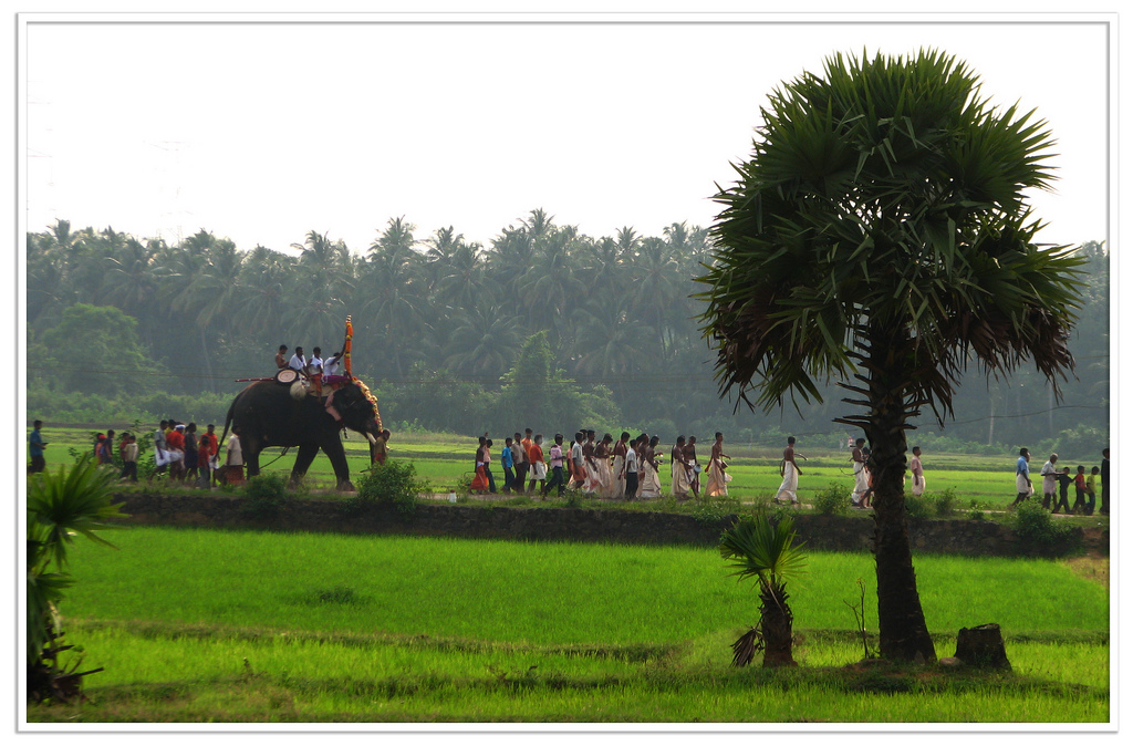 വണ്ടാഴി ശ്രീ കയറമുത്തൻ സഹായം വേല